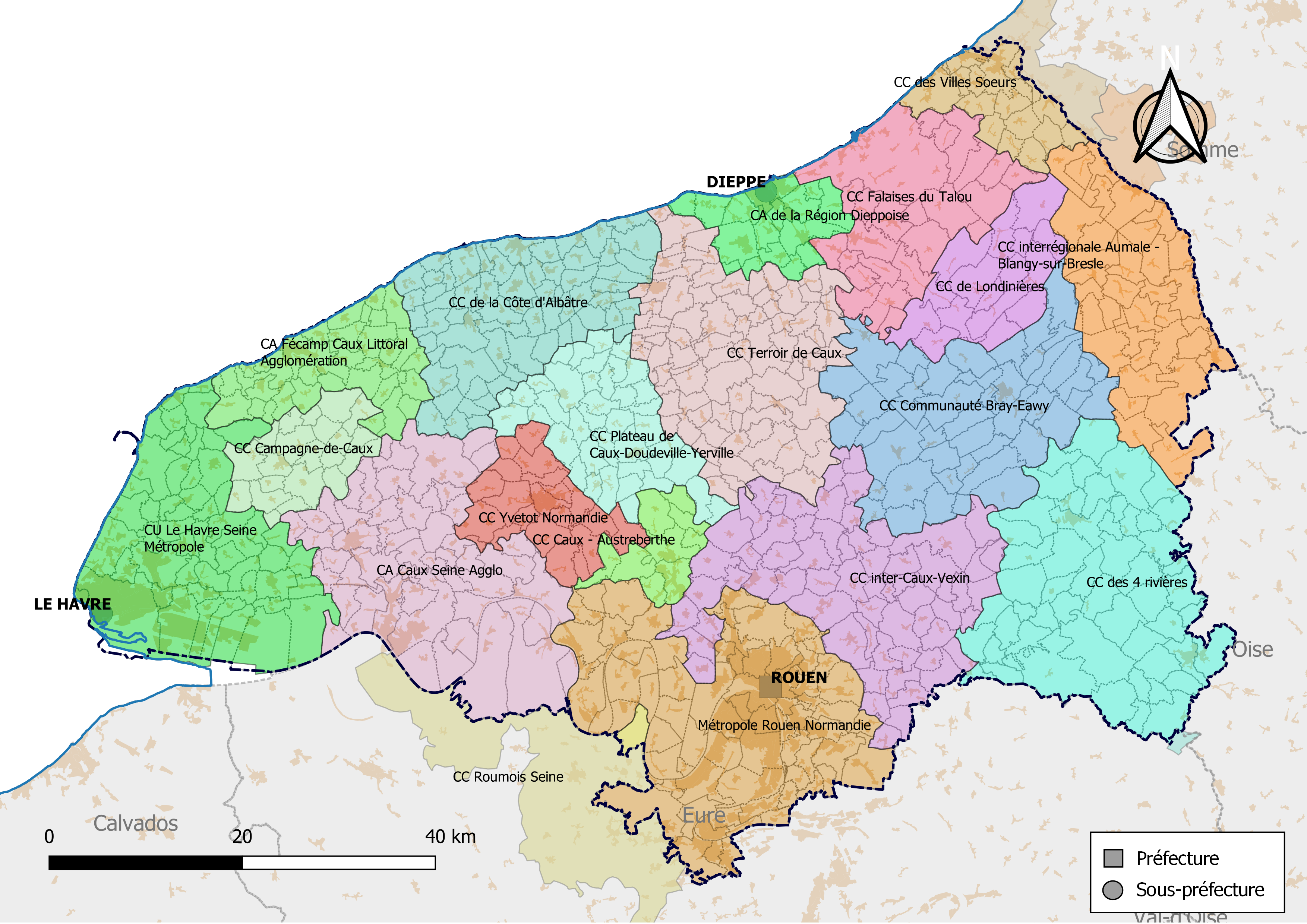 Carte des intercommunalités du département de Seine-Maritime, France. Composition au 1er janvier 2019.